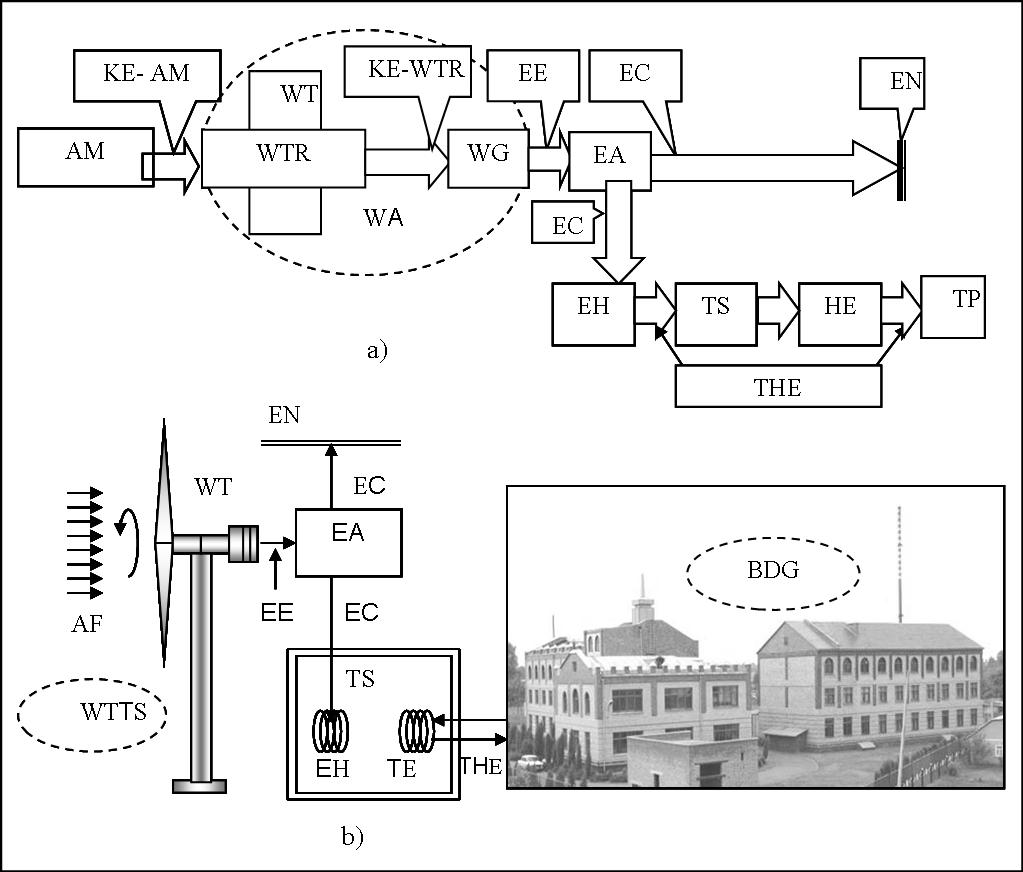 Вітротурбінна система теплопостачання населених пунктів